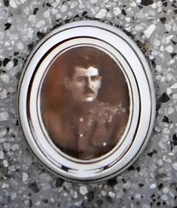 Fotografie Jaroslava Šafránka, československého legionáře, pořízena v srpnu 2013 v Novosedlech nad Nežárkou. Více na